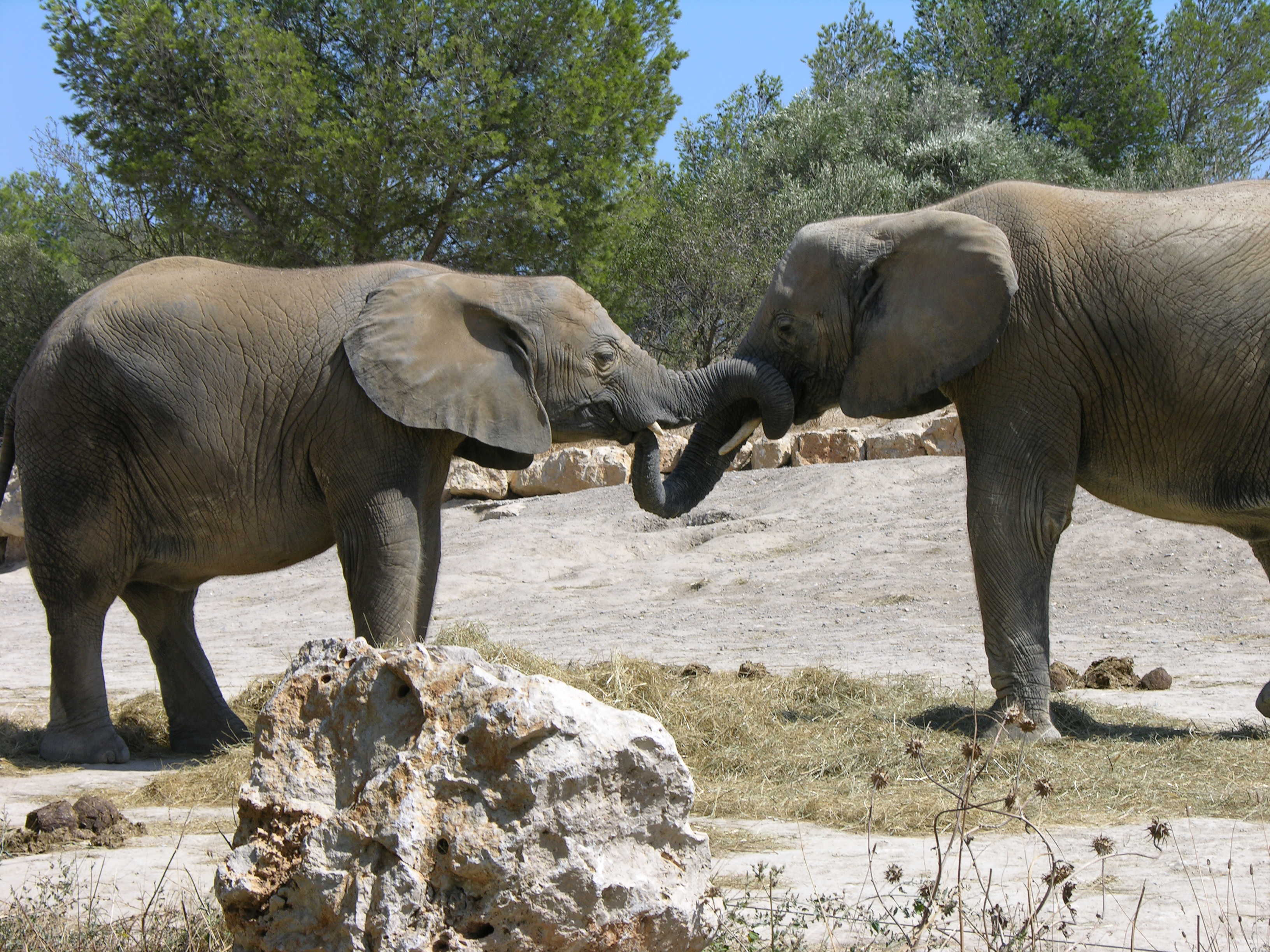 Loxodonta africana , parella d'elefants africans de la sabana , a la reserva africana de sigean o sijan